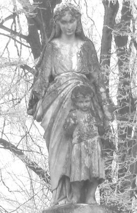 Environs du Château Réal un jour de givre